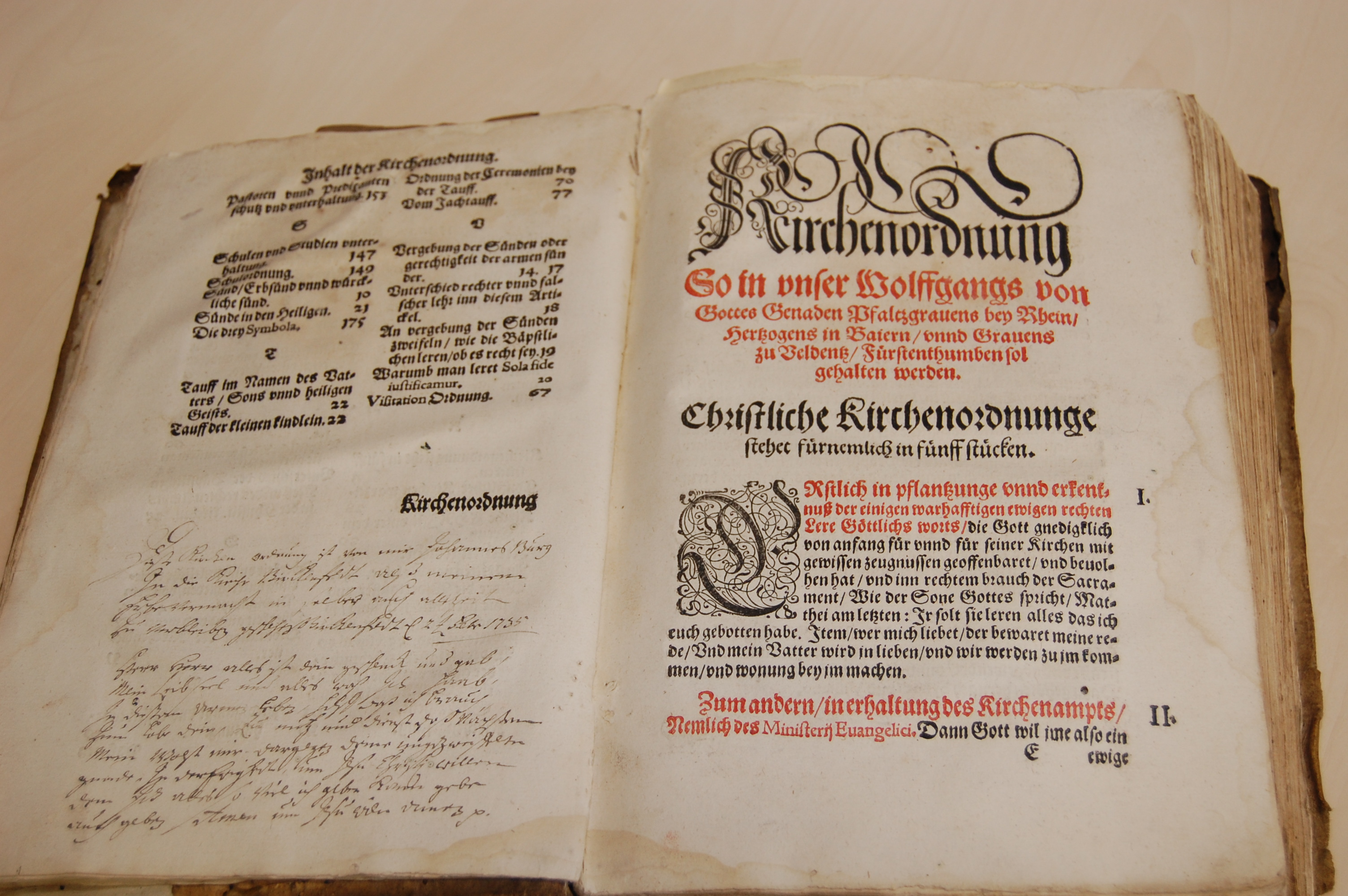 Seite aus der Kirchenordnung Herzog Wolfgangs von Zweibrücken (Ausgabe von 1570)